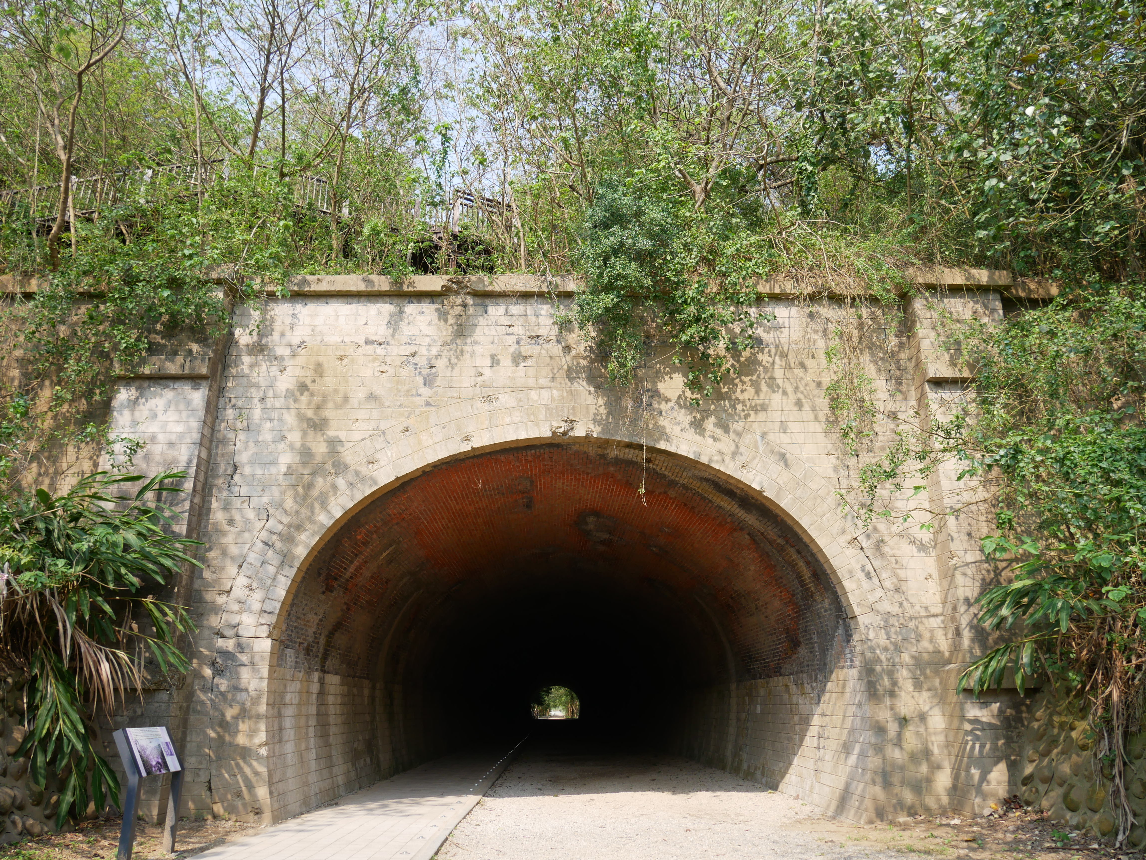 中文（台灣）: 崎頂一號隧道，苗栗縣竹南鎮崎頂里